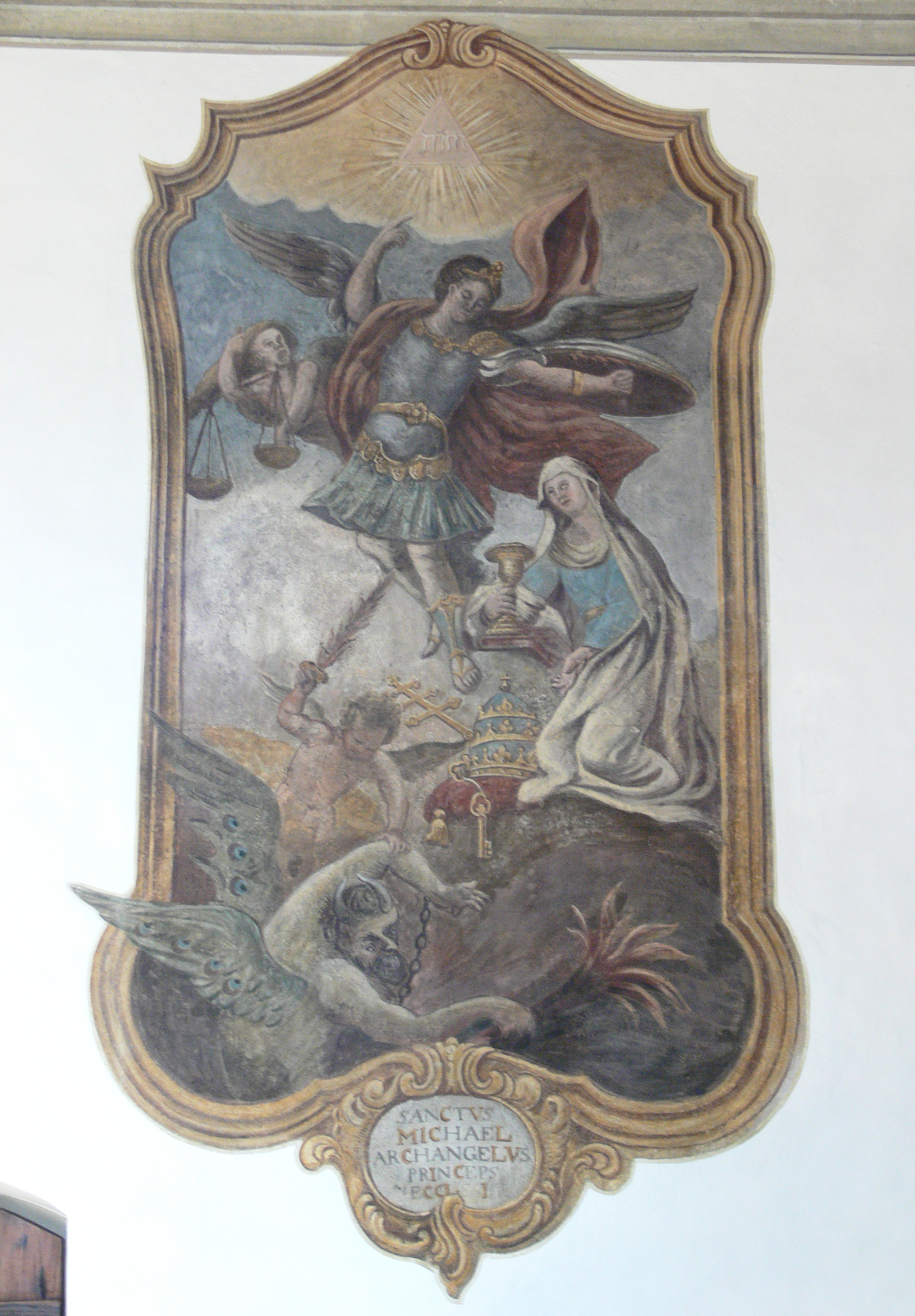 Katholische Pfarrkirche St. Ursula, Horgenzell, Landkreis Ravensburg Wandgemälde von Johann Baptist Bergmüller, 1763: St. Michael beschirmt die Kirche, Inschrift "sanCtVs MIChaeL arChangelVs prinCeps eCClesIae" mit Chronogramm 1763